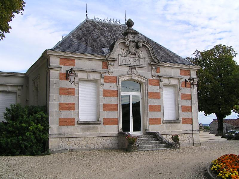 mairie d'Angeac-Champagne en Charente